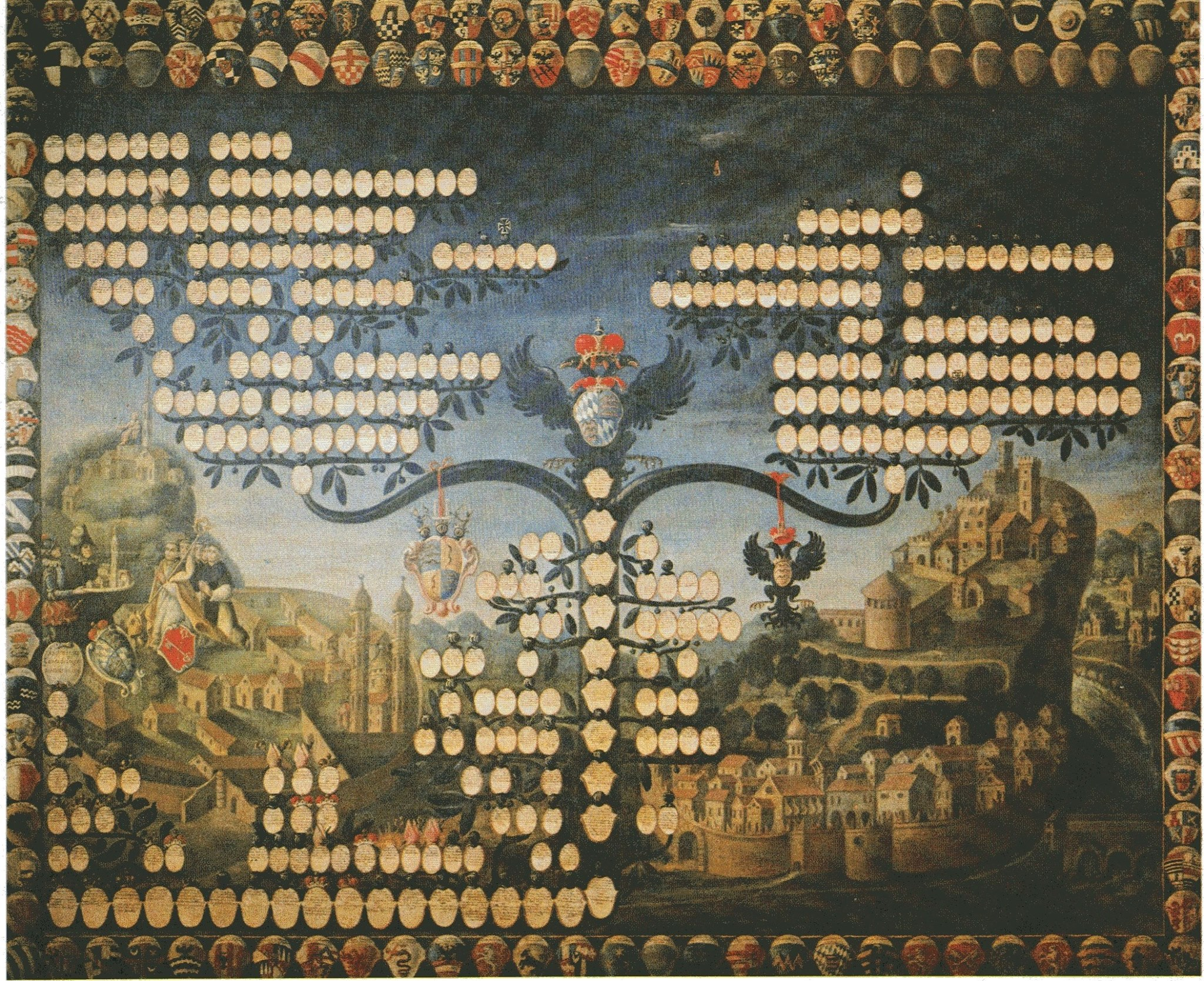 lbero genealogico della casata dei Conti D'Arco